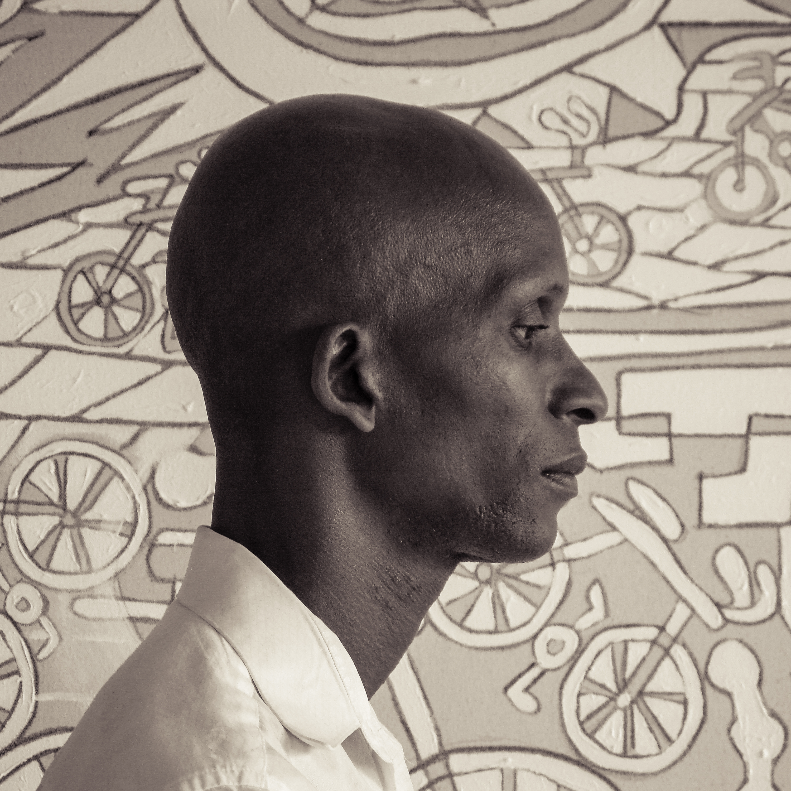 Victor Matthews in his studio, in front of one of his paintings